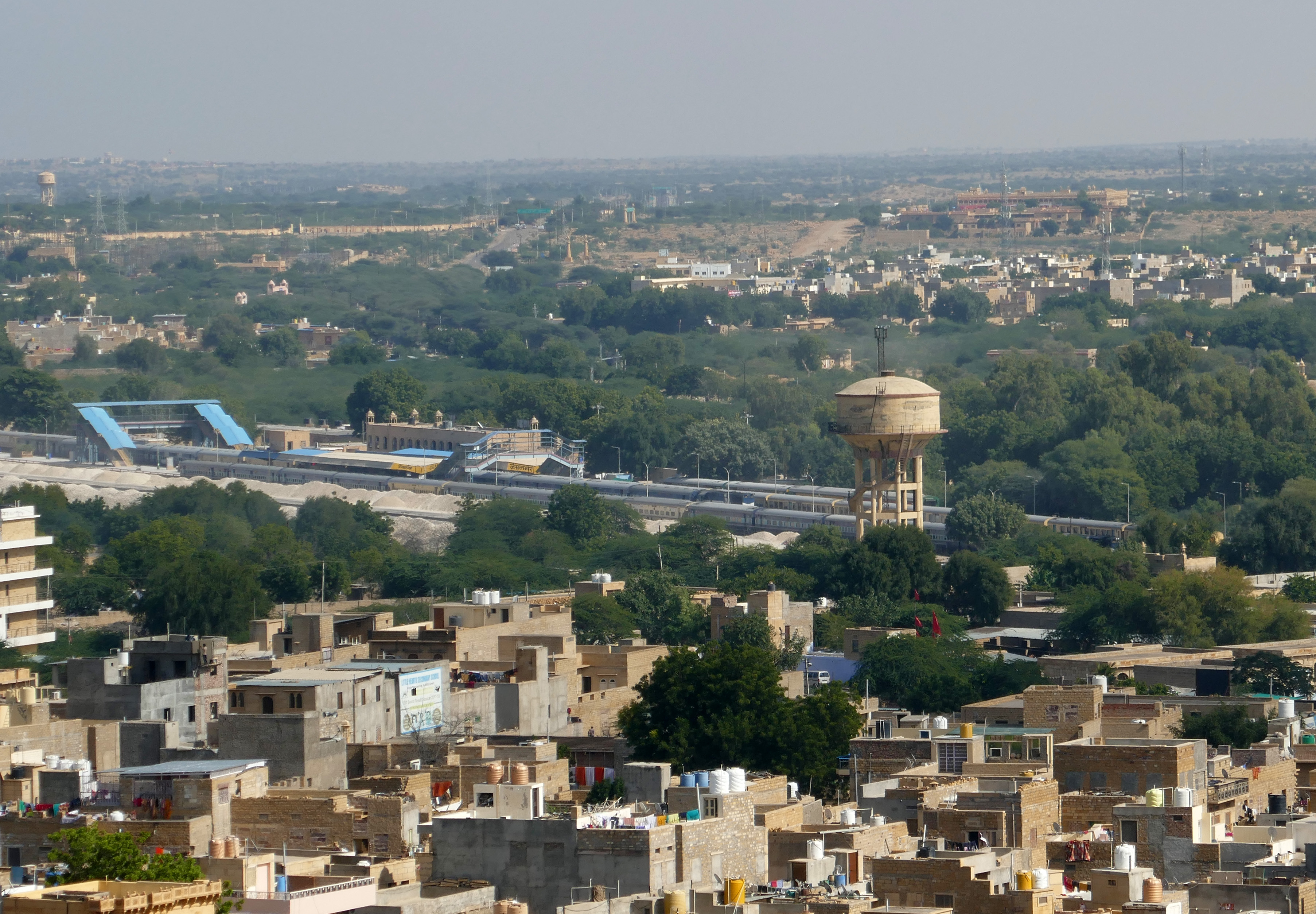 La gare de Jaisalmer (Rajasthan) vue depuis le fort.